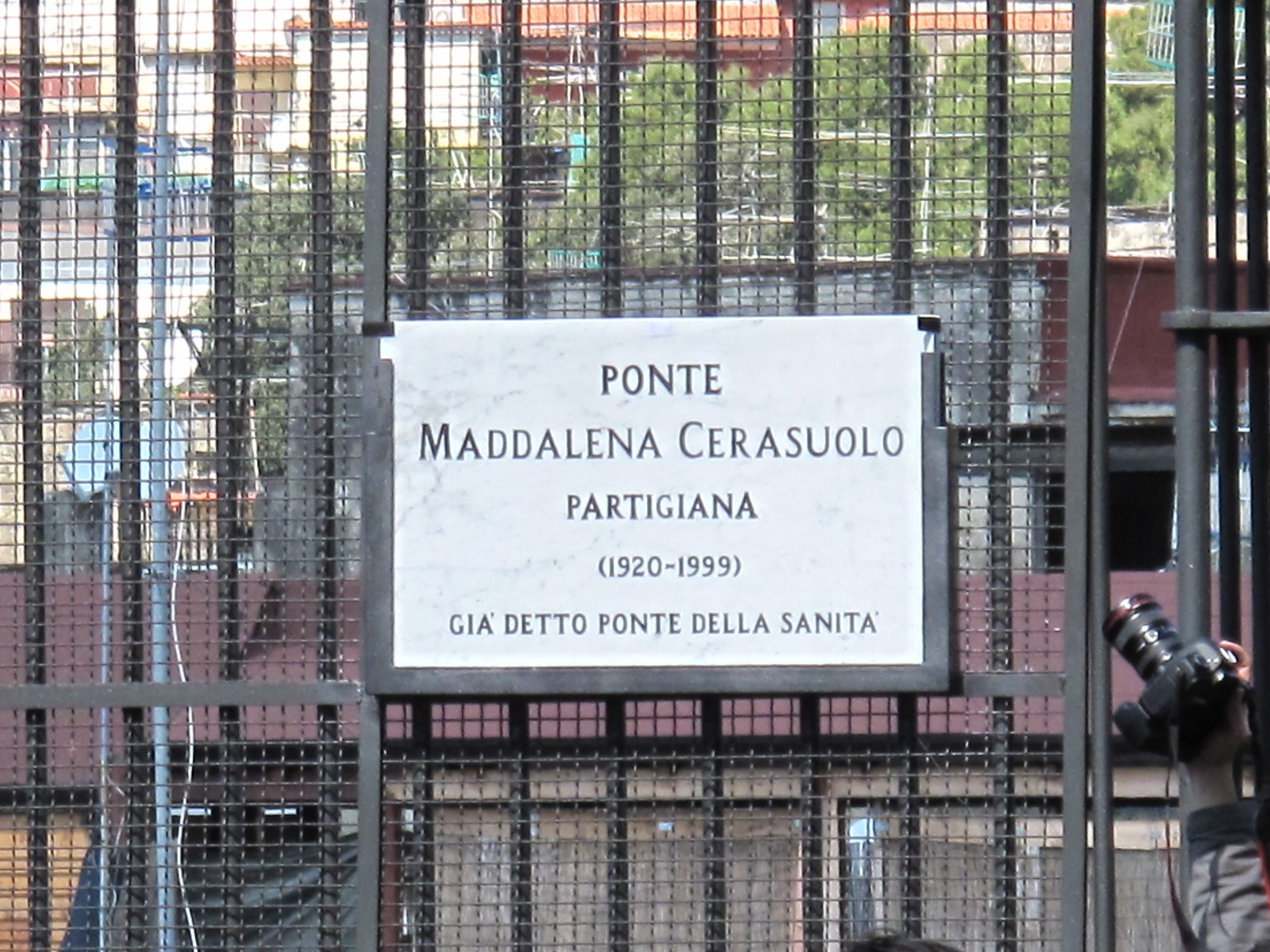 Targa stradale recante il nuovo toponimo del ponte della Sanità, a Napoli, dedicato ora a Maddalena Cerasuolo